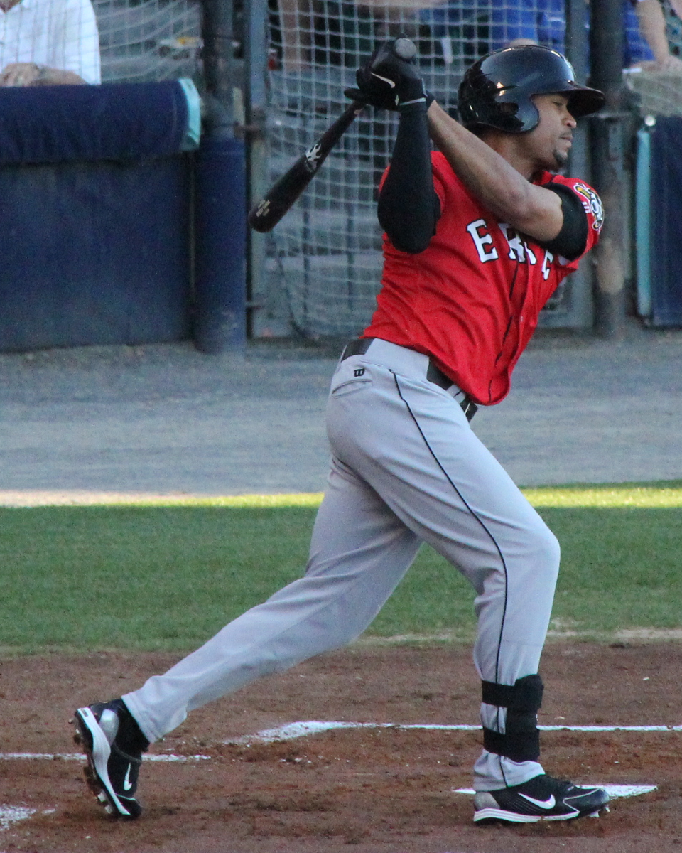 Daniel Fields